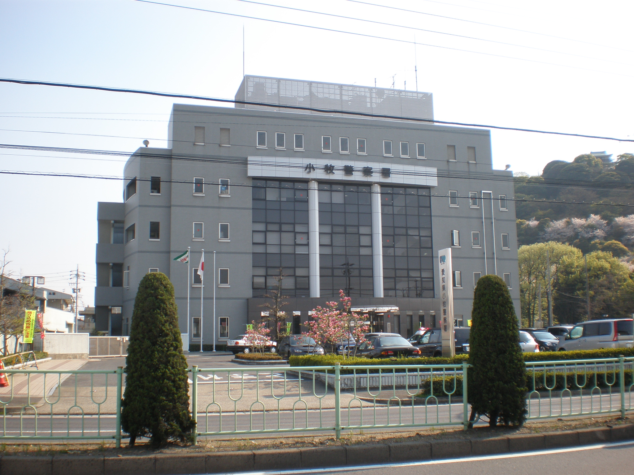 愛知県小牧市にある小牧警察署